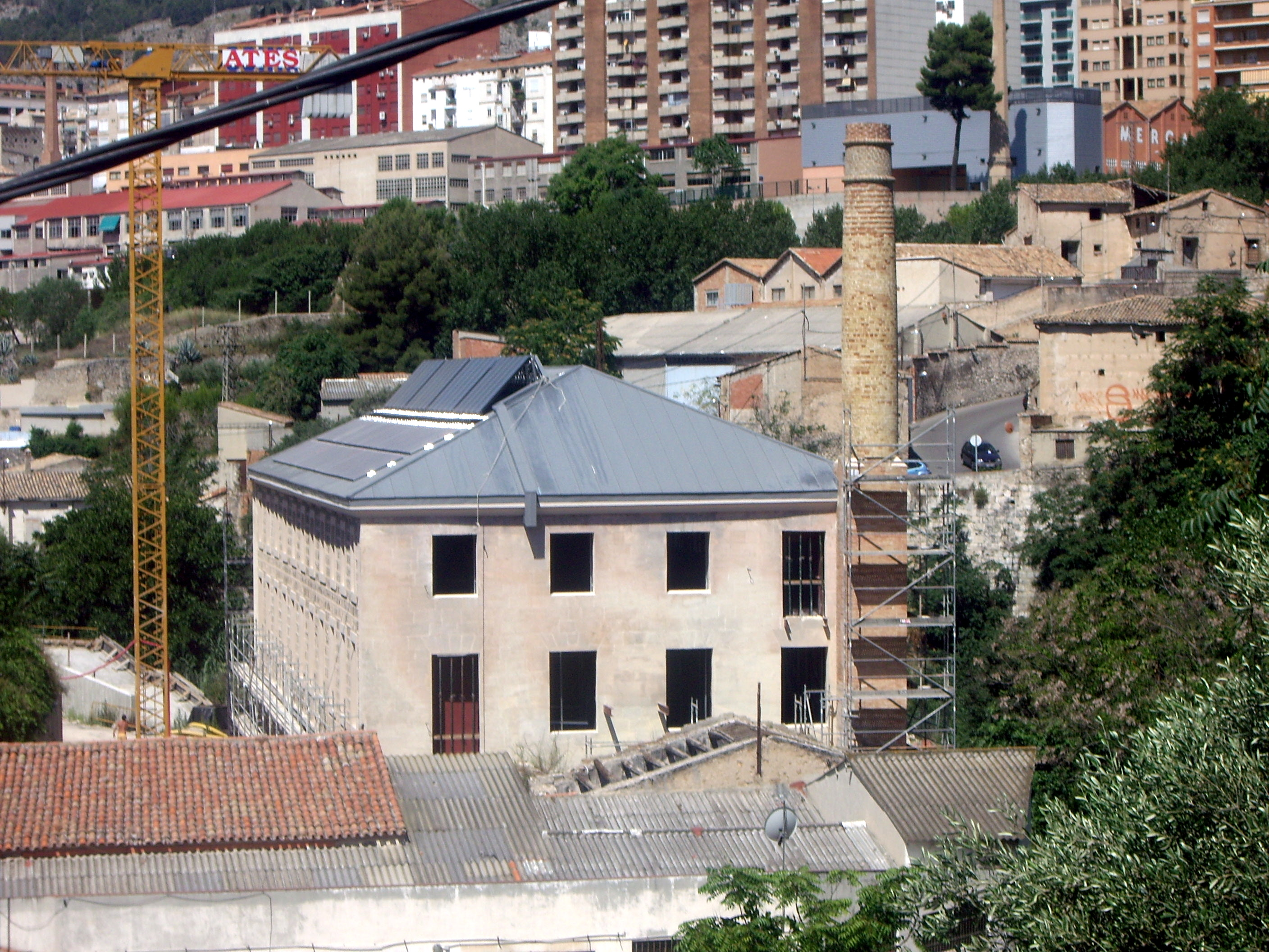 La cotonera de Barceló, Raduan i Gavarró, coneguda popularment com "La fàbrica dels tacos". Restauració.